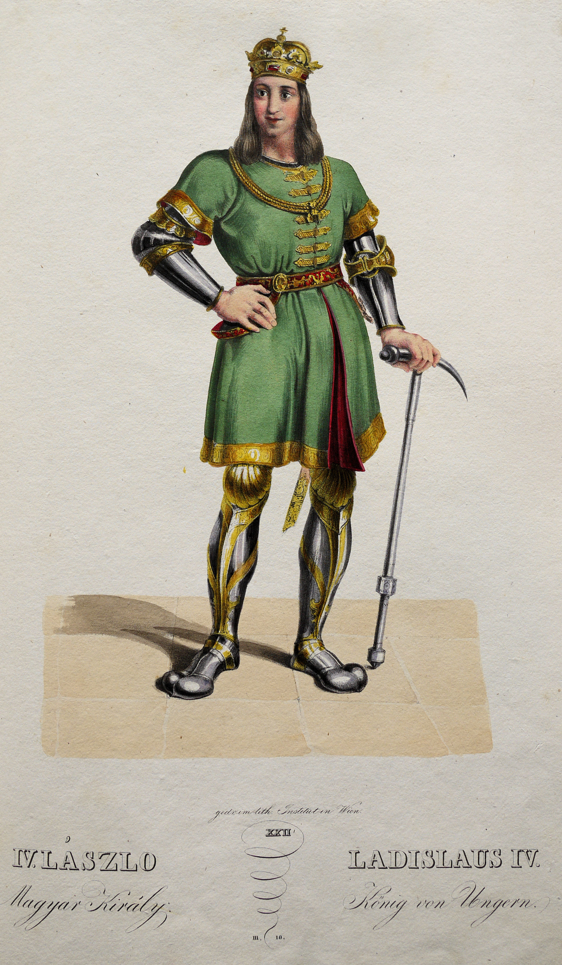 Ladislaus IV. (1262-1290), König von Ungarn etc.; Lithographie von Josef Kriehuber nach einer Zeichnung von Moritz von Schwind aus Ungerns Erste Heerführer Herzoge und Koenige In einer Reihe von Bildnissen von Bela bis auf Seine Majestät Franz I. Kaiser Von Österreich König Von Ungern &c., &c. Wien : Lithographisches Institut ;ca. 1828